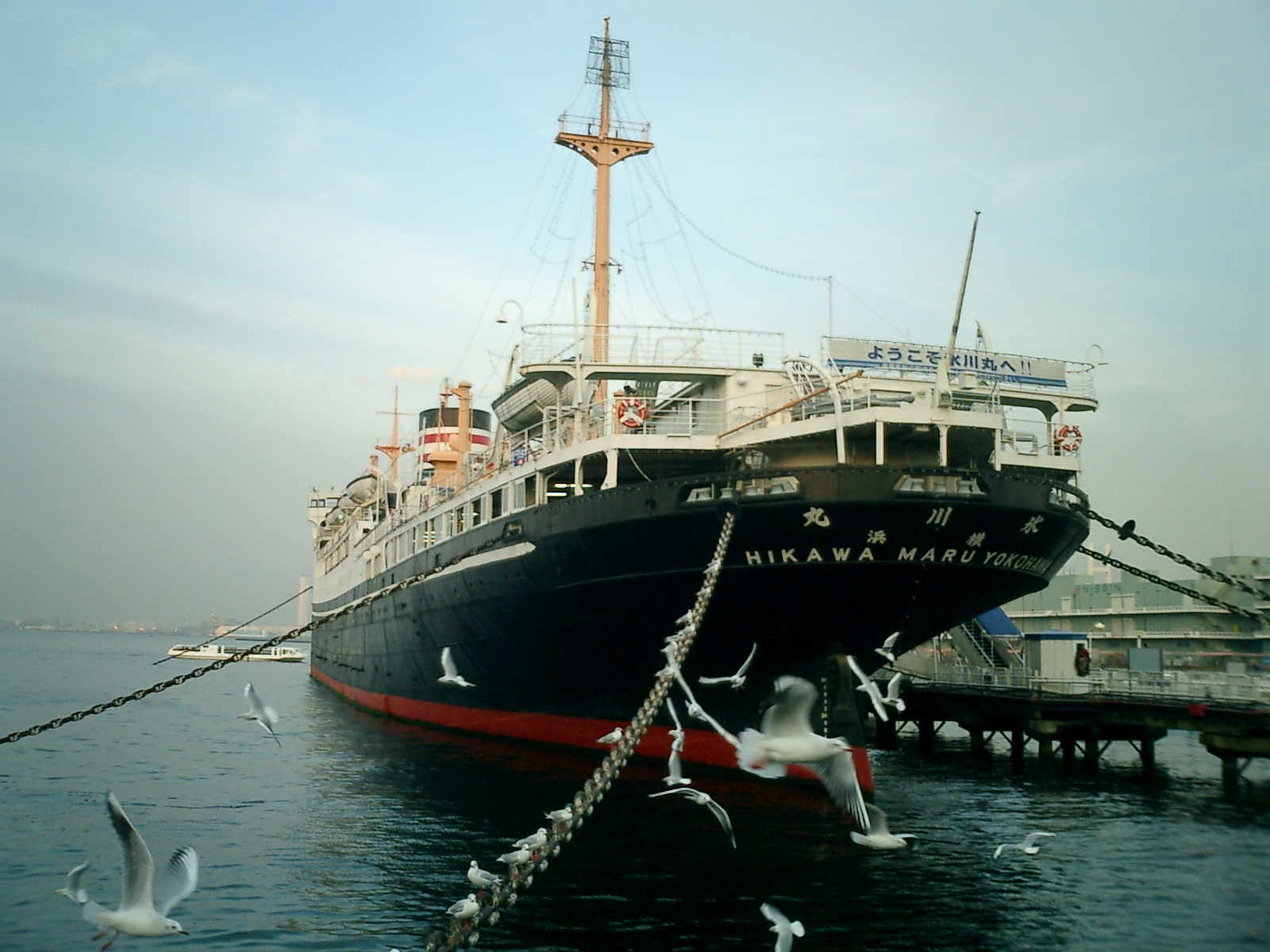 Ship "Hikawa maru" at Yokohama port Japan.